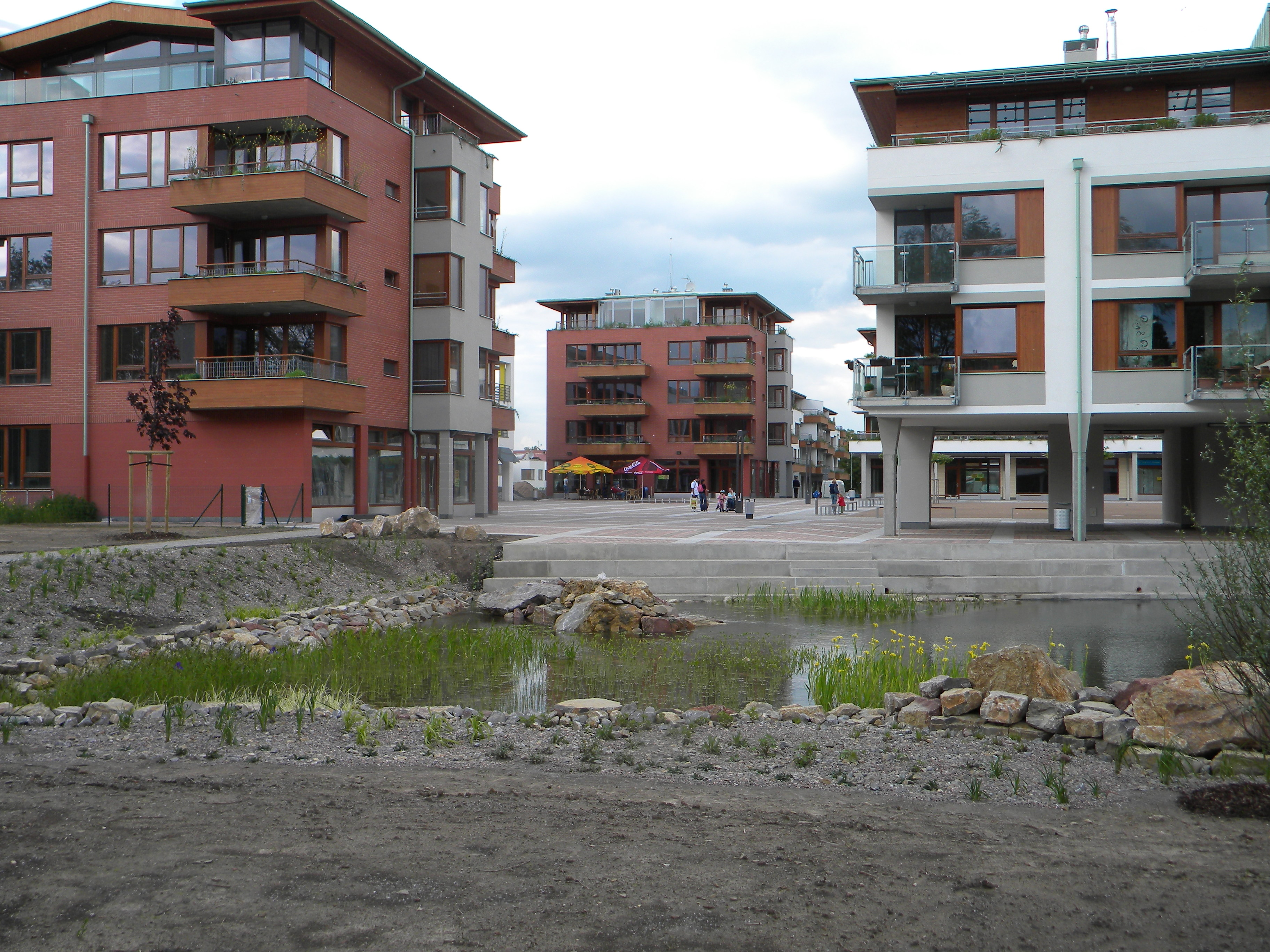 Jezírko u nového náměstí Na Sádkách v Dolních Břežanech.